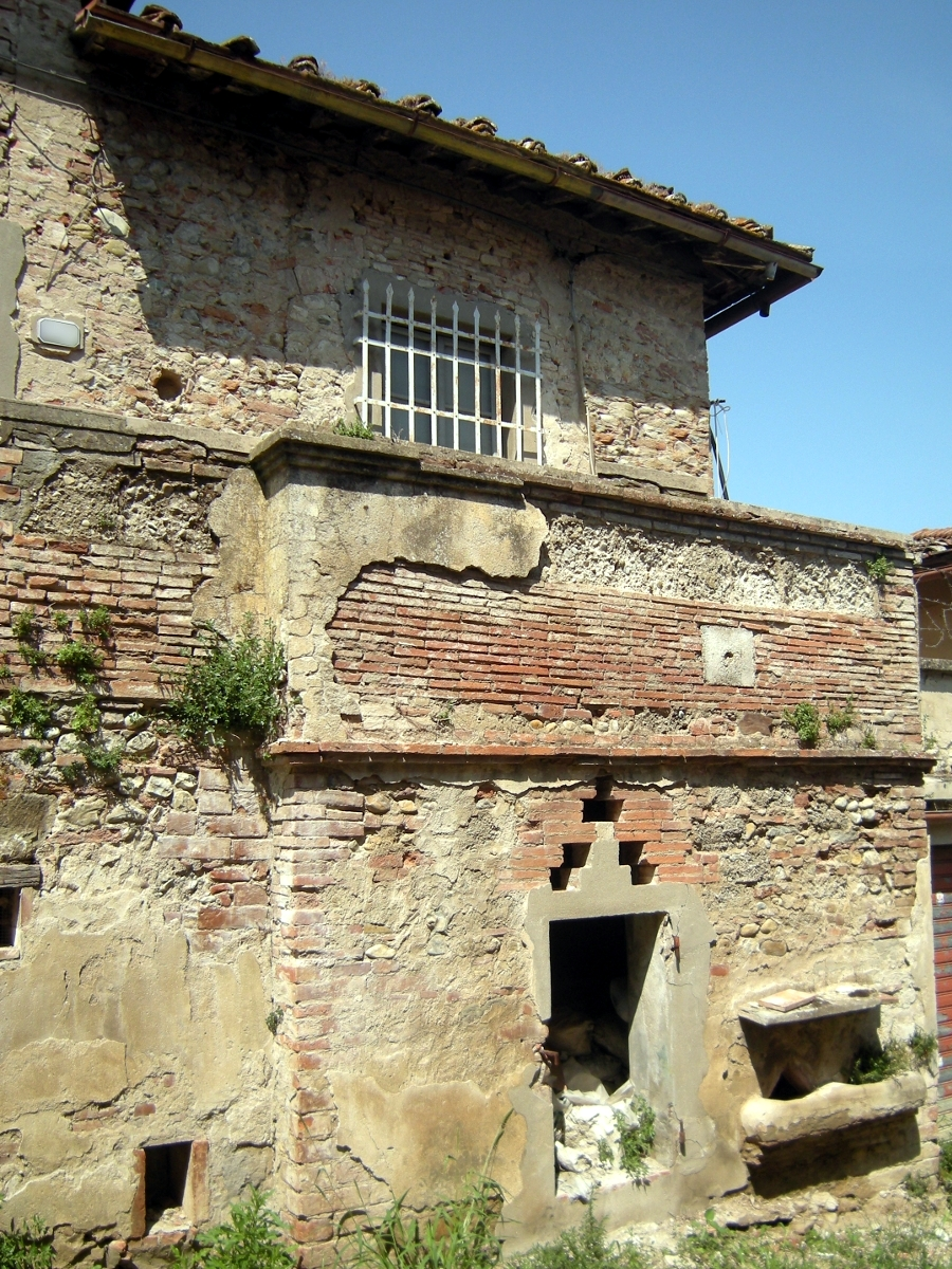 Casa rurale (fine XIX secolo circa) nei dintorni di Empoli